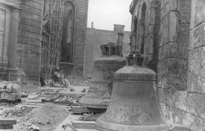 Wiederaufbau der Paulskirche in Frankfurt/Main 1947. Bild zeigt: Die erhalten gebliebenen Glocken Barfüßerglocke und Dankesglocke. Foto: EDU-Illus 993-47